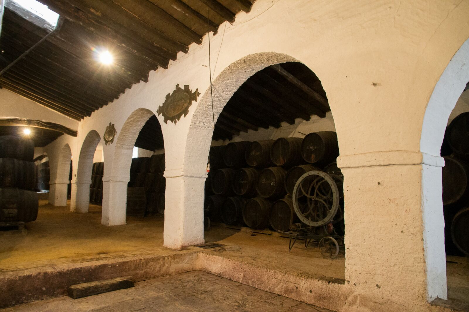 Vista interior de la Bodega, concretamente desde el lagar de Bodegas Góngora de Villanueva del Ariscal (Sevilla)